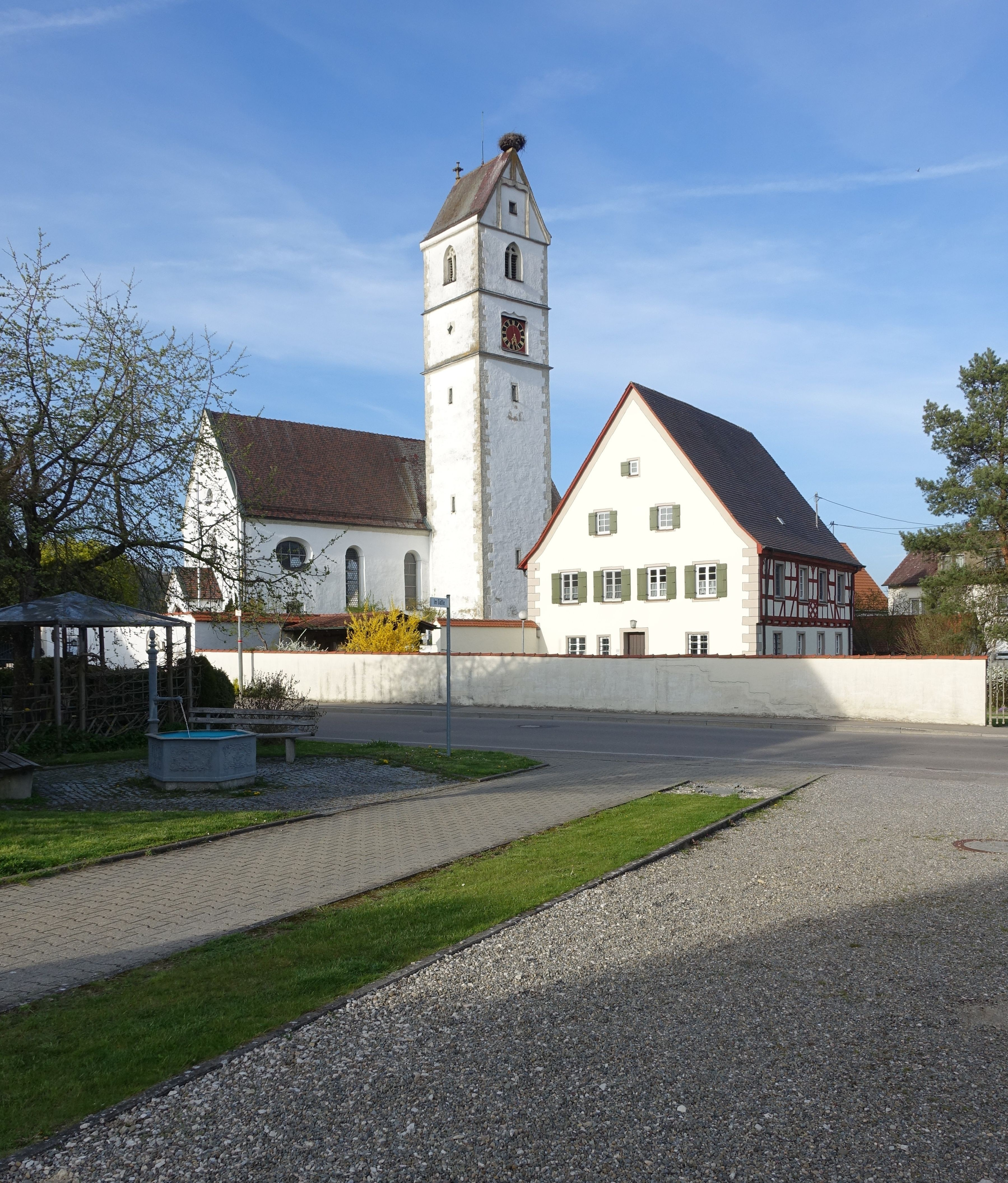 Zwiefaltendorf - Kirche in der Ortsmitte